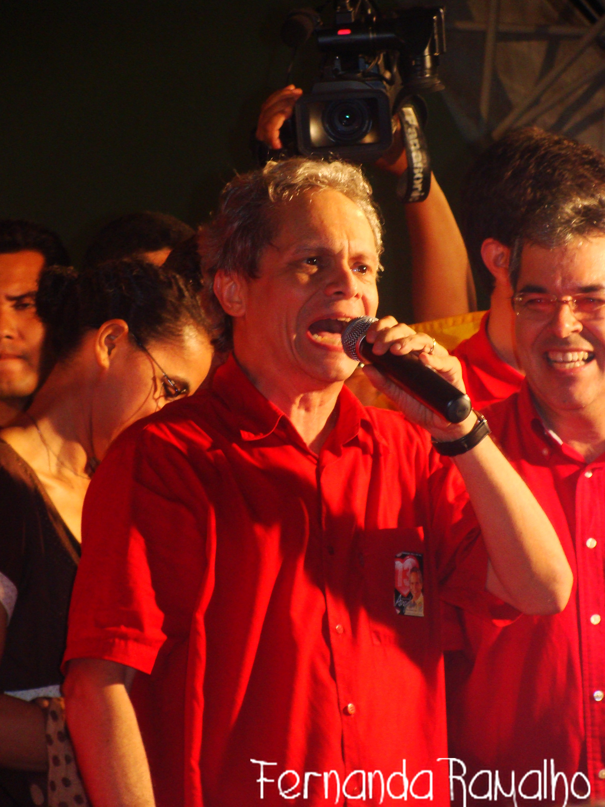 Raimundo Angelim, então prefeito de Rio Branco.